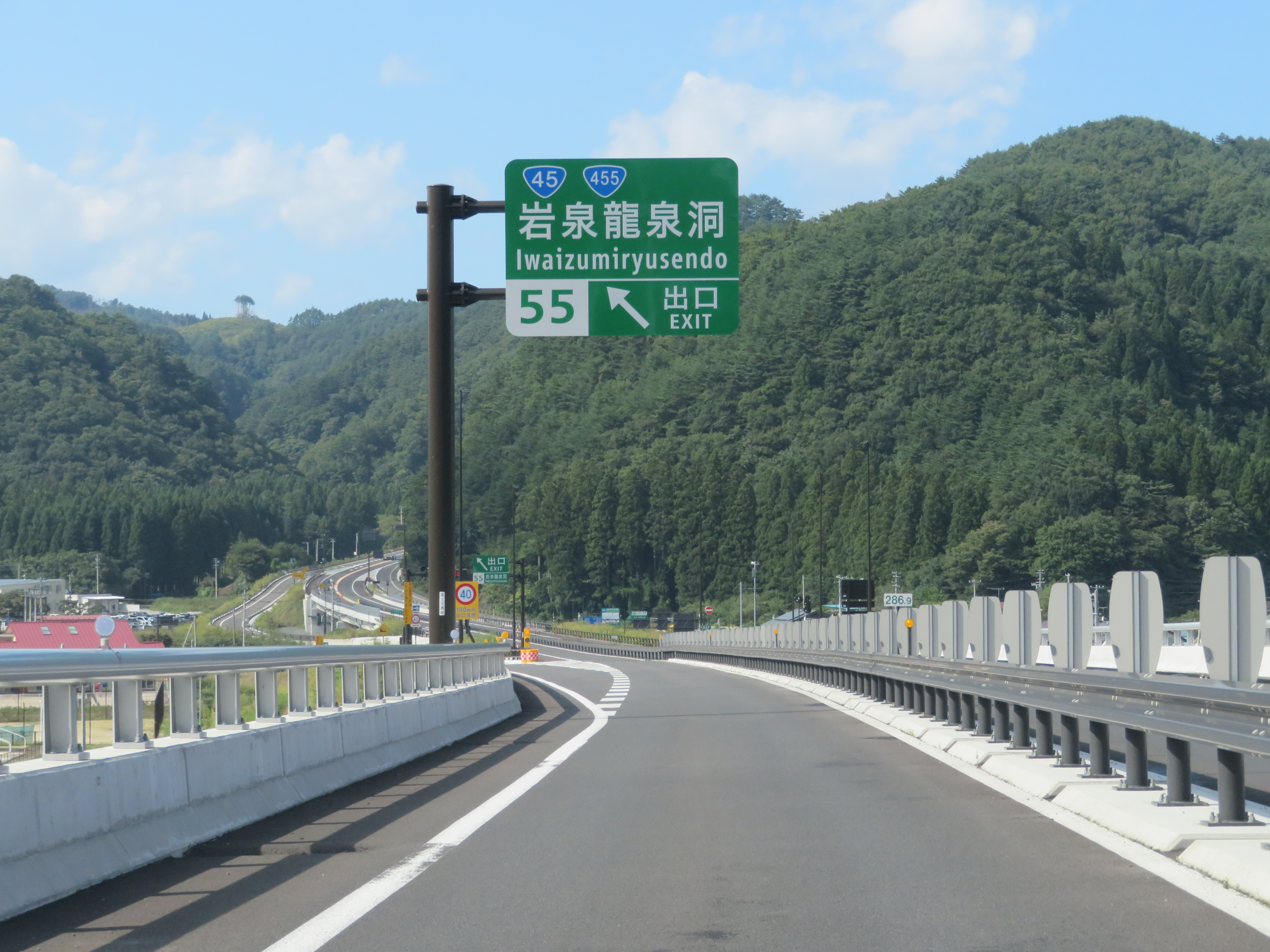 三陸北縦貫道路岩泉龍泉洞インターチェンジ（田老真崎海岸ＩＣ方面から撮影） Canon PowerShot SX720 HS